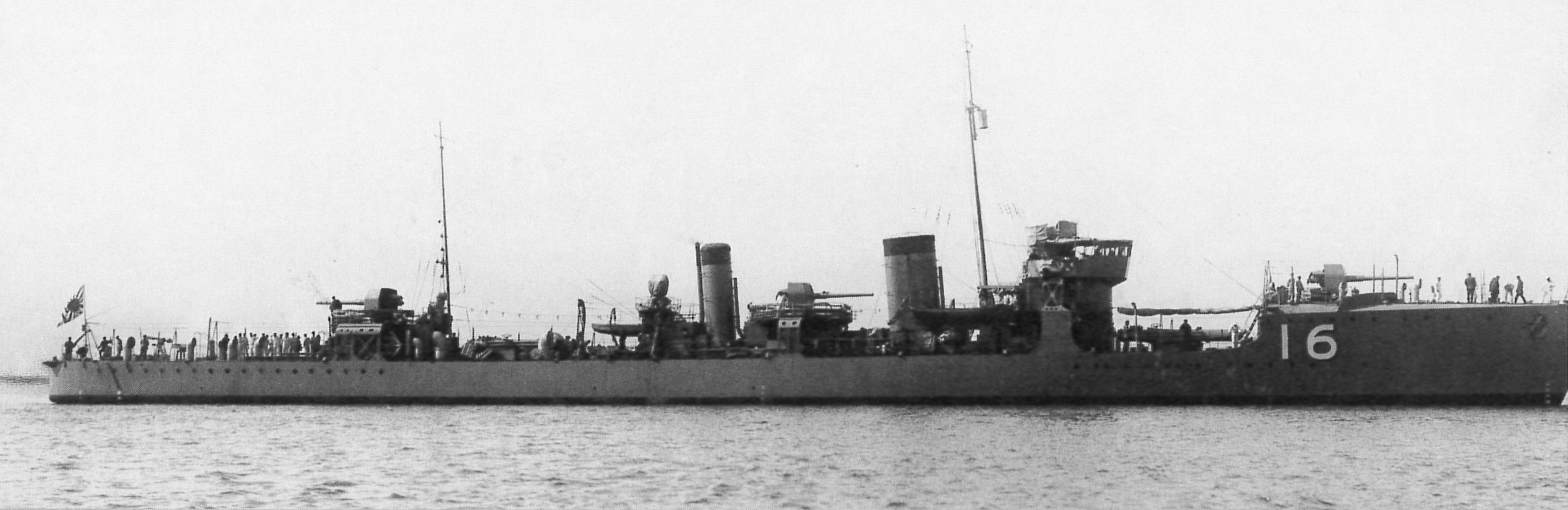 第16駆逐艦、のちの芙蓉。大正12年3月16日藤永田造船所で竣工、引き渡し直後の撮影と思われる。